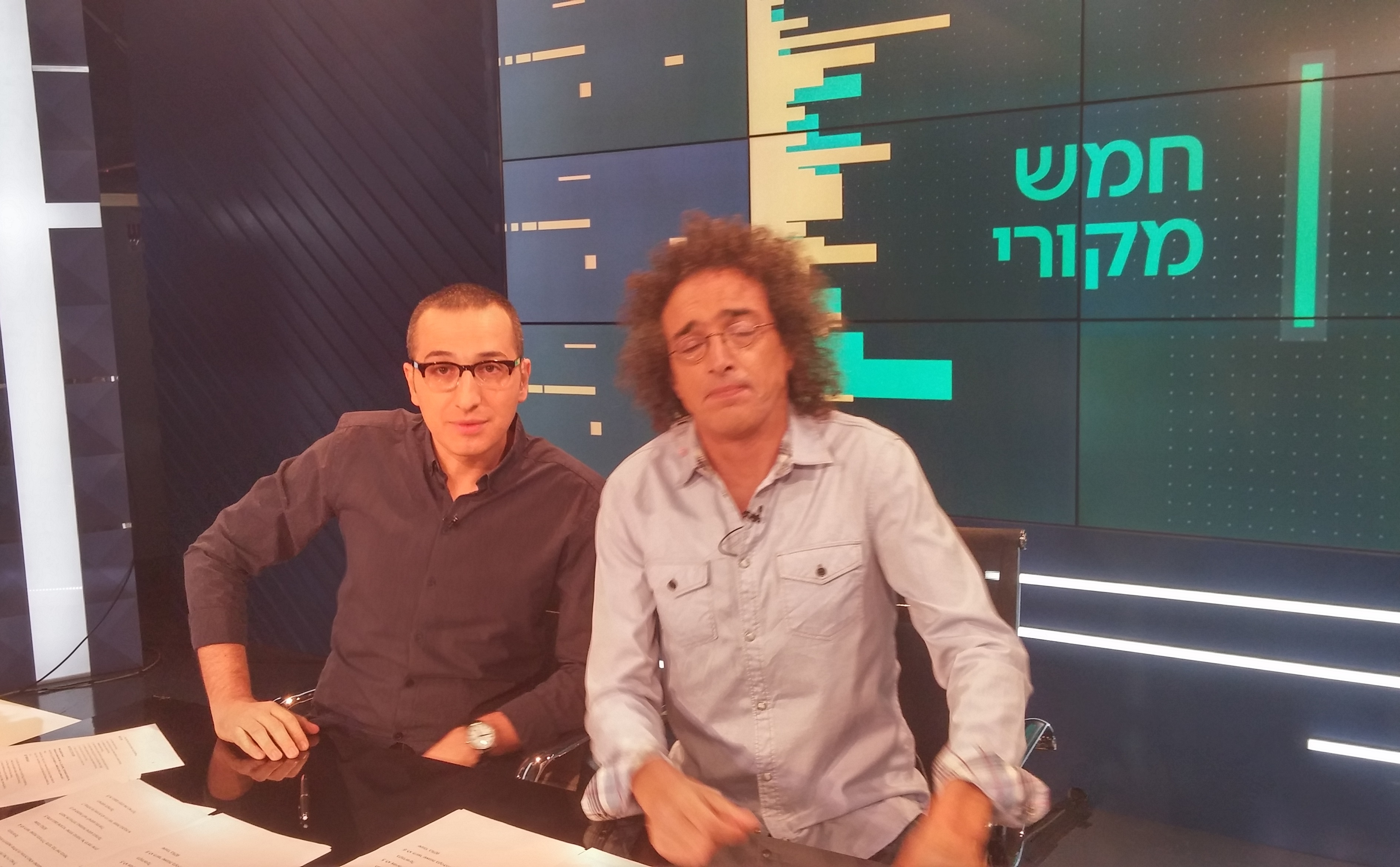 דרור פויר ואבי משולם באולפן "חמש מקורי"